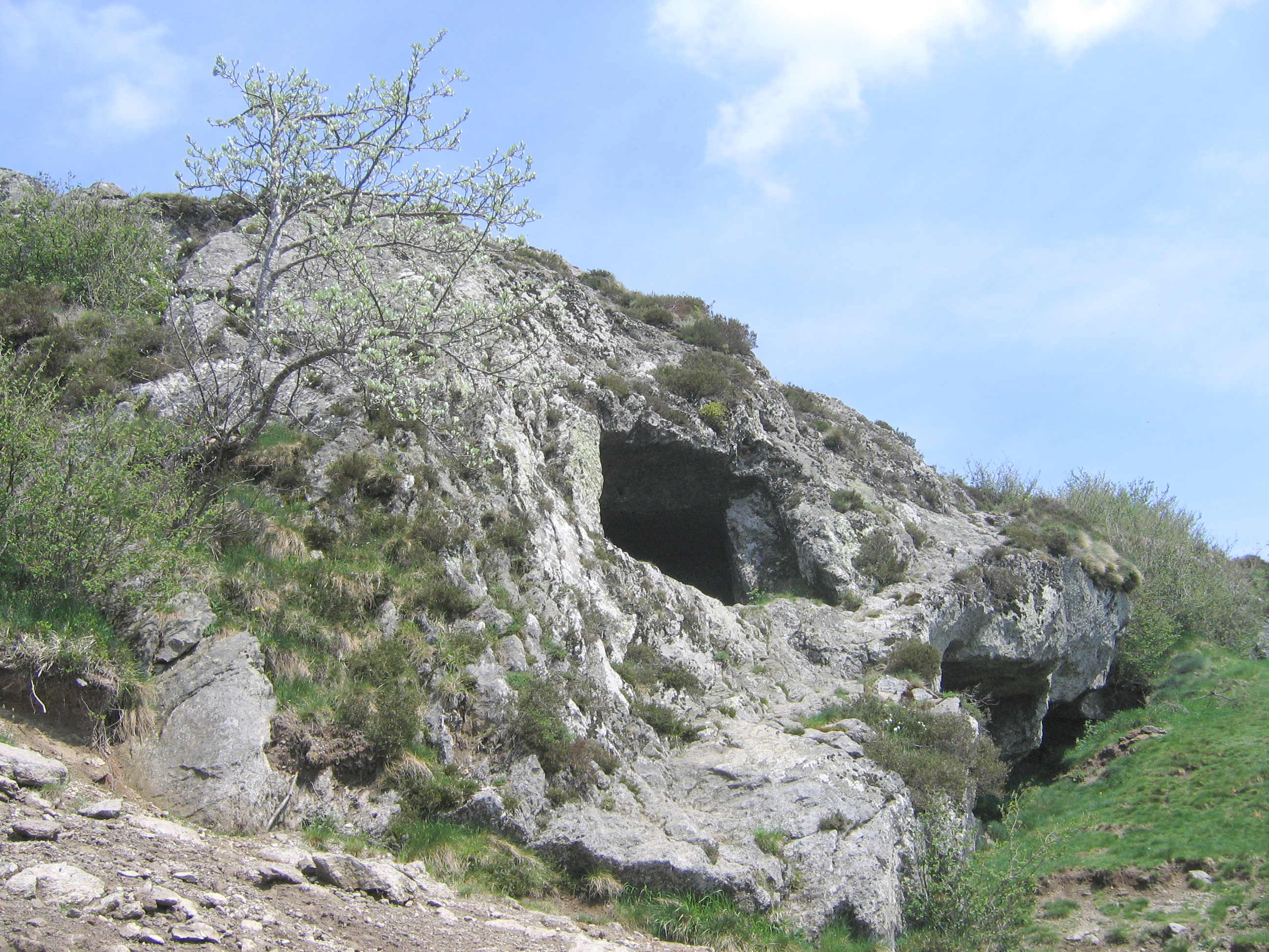 Chaîne des Puys, Petit Suchet : grottes en réalité, carrière d'exploitation de Domite datant de l"époque gallo-romaine et du haut moyen age (Puy-de-Dôme, France).